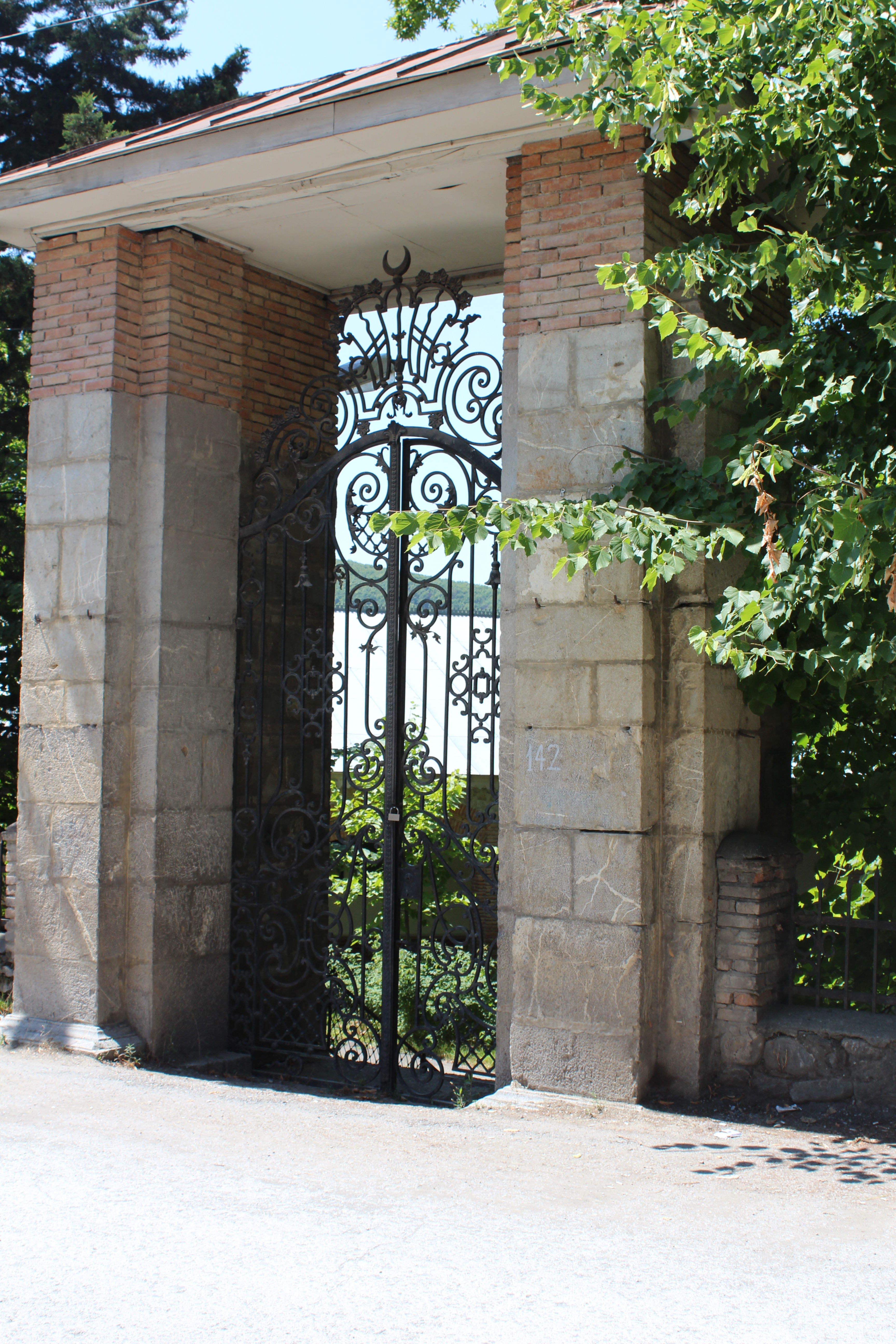 Şəki Xan məscidi, həyətə giriş darvazası